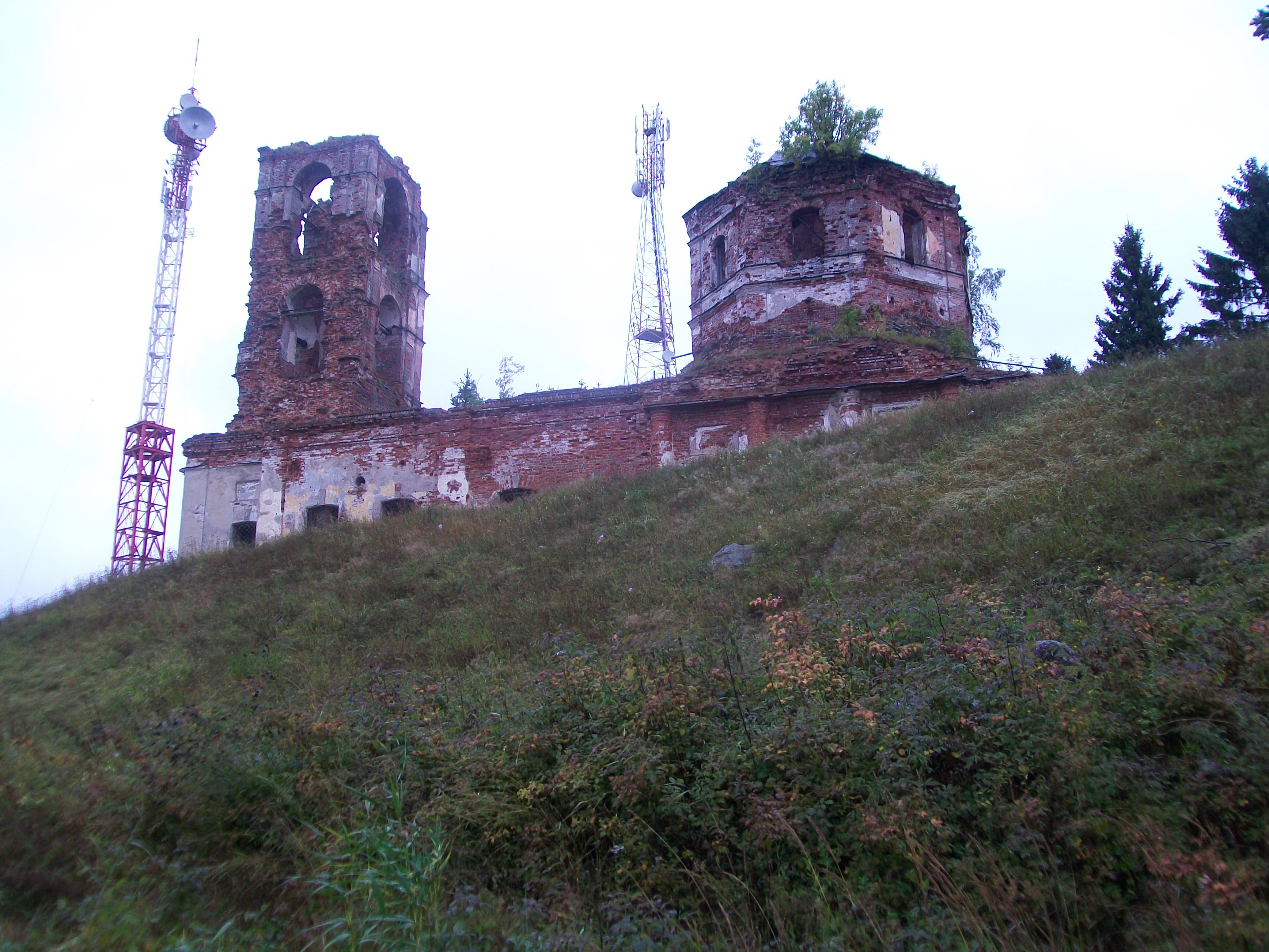 Развалины церкви в Салми